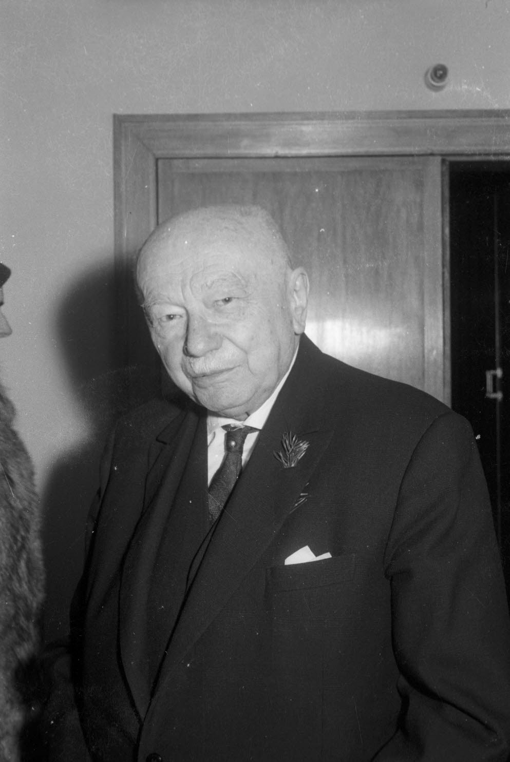 Klose, 1924 ehrenamtlicher Sozialdezernent und Vorsitzender des Zusammenschlusses der öffentlichen und freien Wohlfahrtsverbände, gründete damals die Spendenaktion "Kieler Weihnachtsbaum", um Gelder für notleidende Familien zu sammeln. Sie wurde in Deutschland vielfach kopiert. Später wurde er Direktor des Instituts für Hygiene der Christian-Albrechts-Universität (CAU).